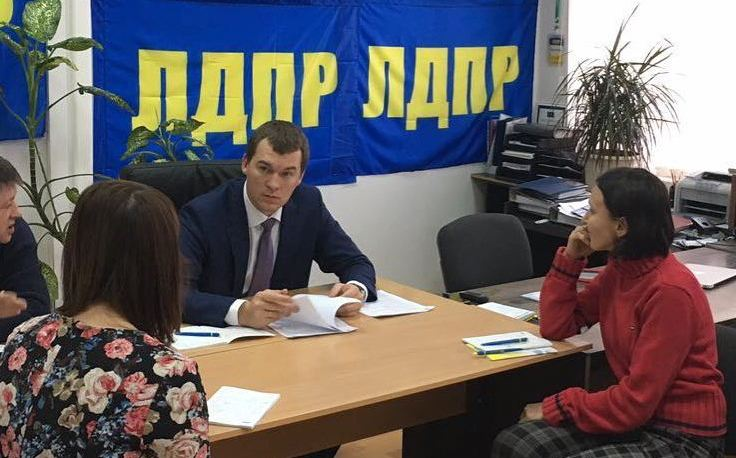 Михаил Дегтярёв на приёме граждан в Татарстане, 26 ноября 2016 года